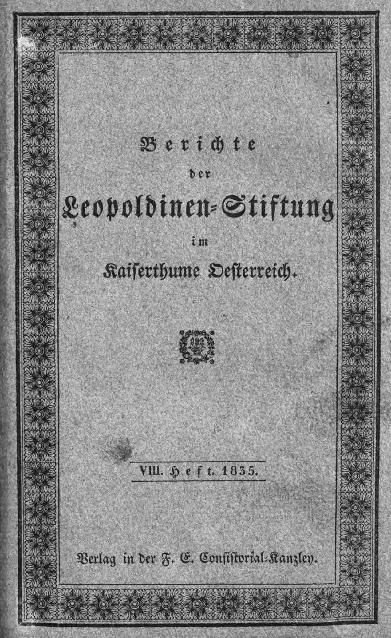 Berichte der Leopoldinen-Stiftung im Kaiserthume Oesterreich. Heft VIII, 1835, Titelseite